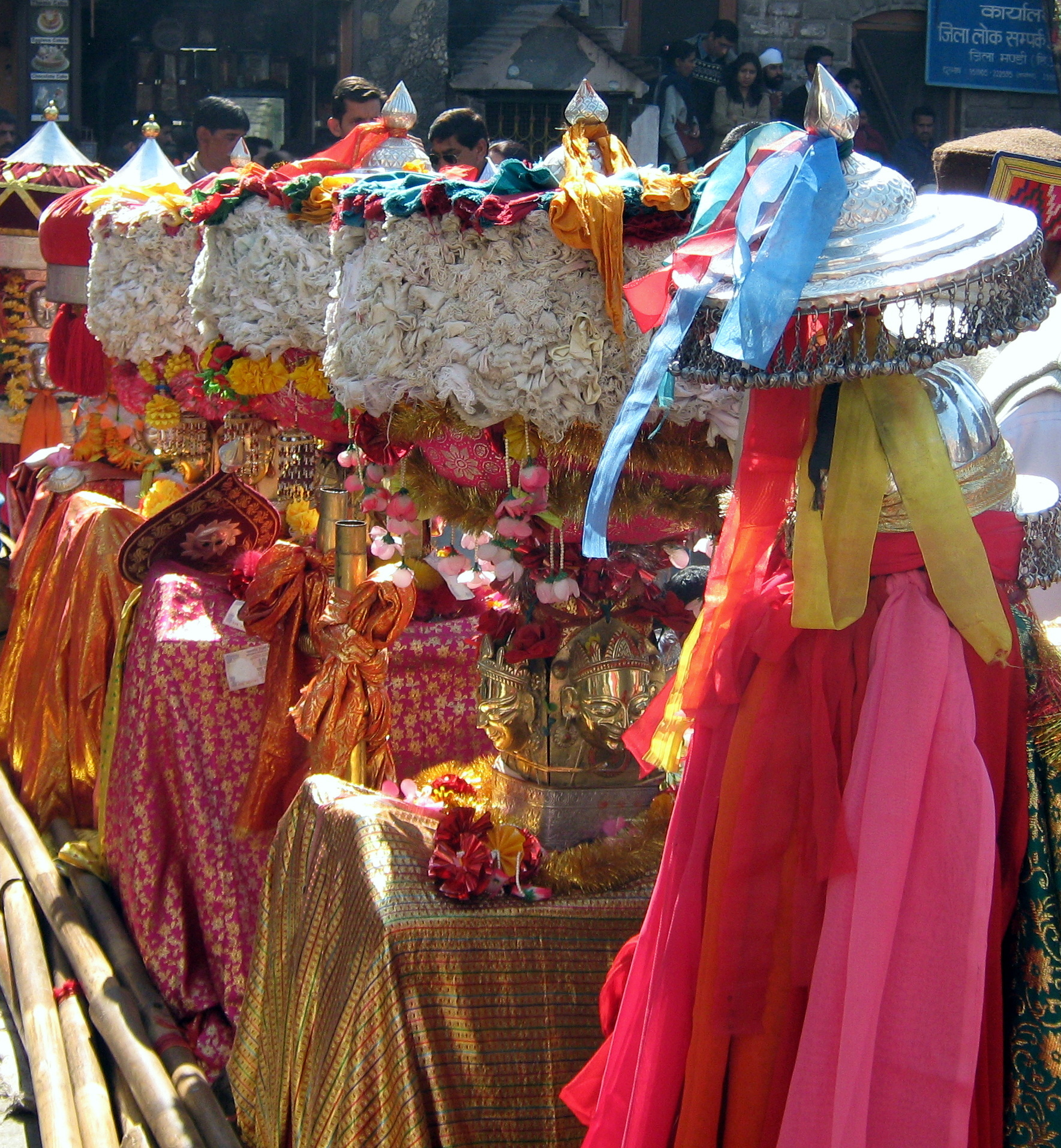 W:Mandi Shivaratri Fair